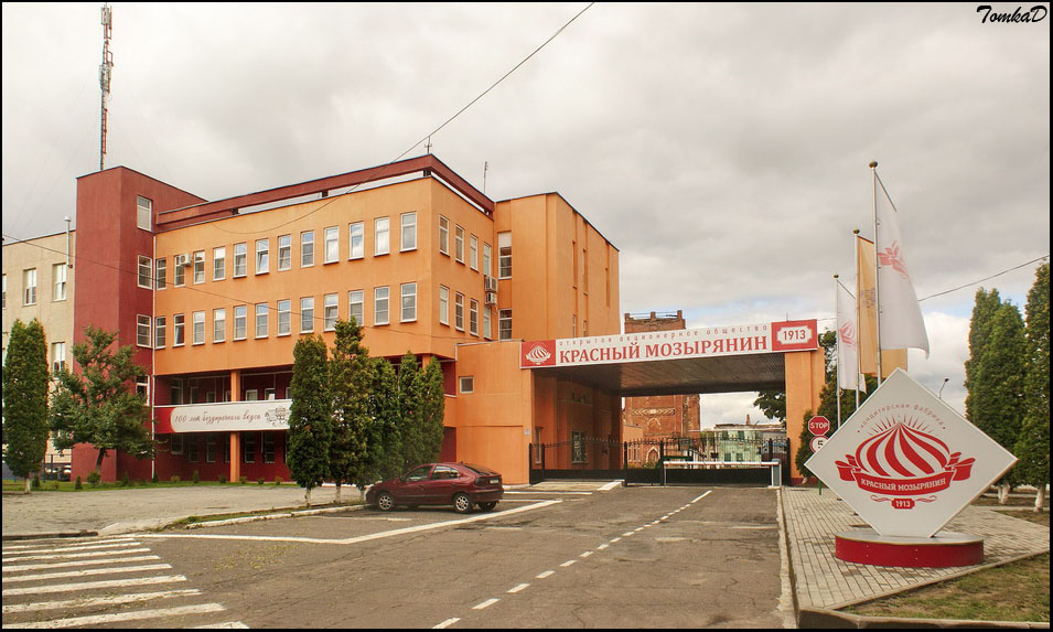 Нароўля. Чырвоны Мазыранін